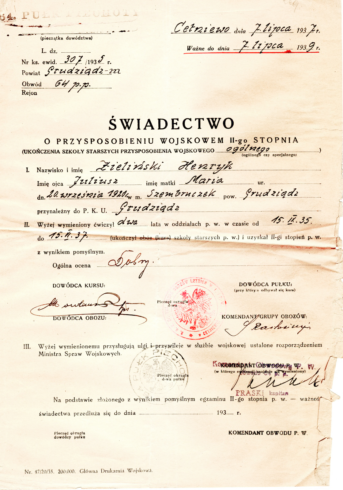 świadectwo odbycia przez Henryka Zielińskiego przeszkolenia w ramach przysposobienia wojskowego(na dokumencie błędnie podana data urodzenia; powinno być 22 września 1920)